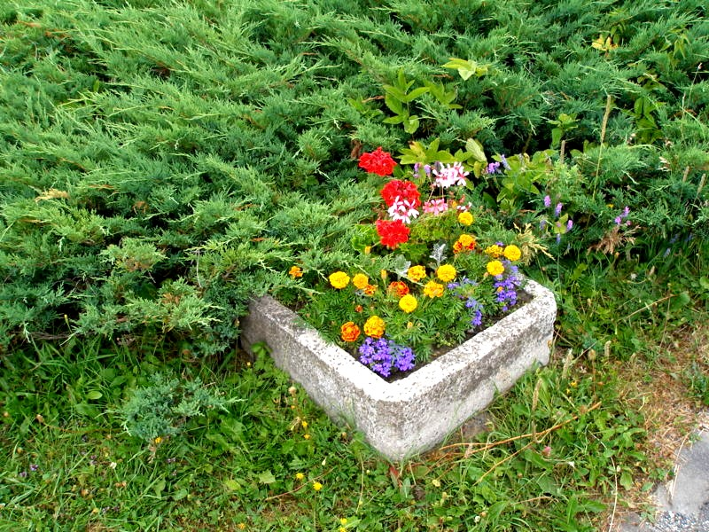 Kvety v osade Tatranské Zruby, Vysoké Tatry,Slovakia